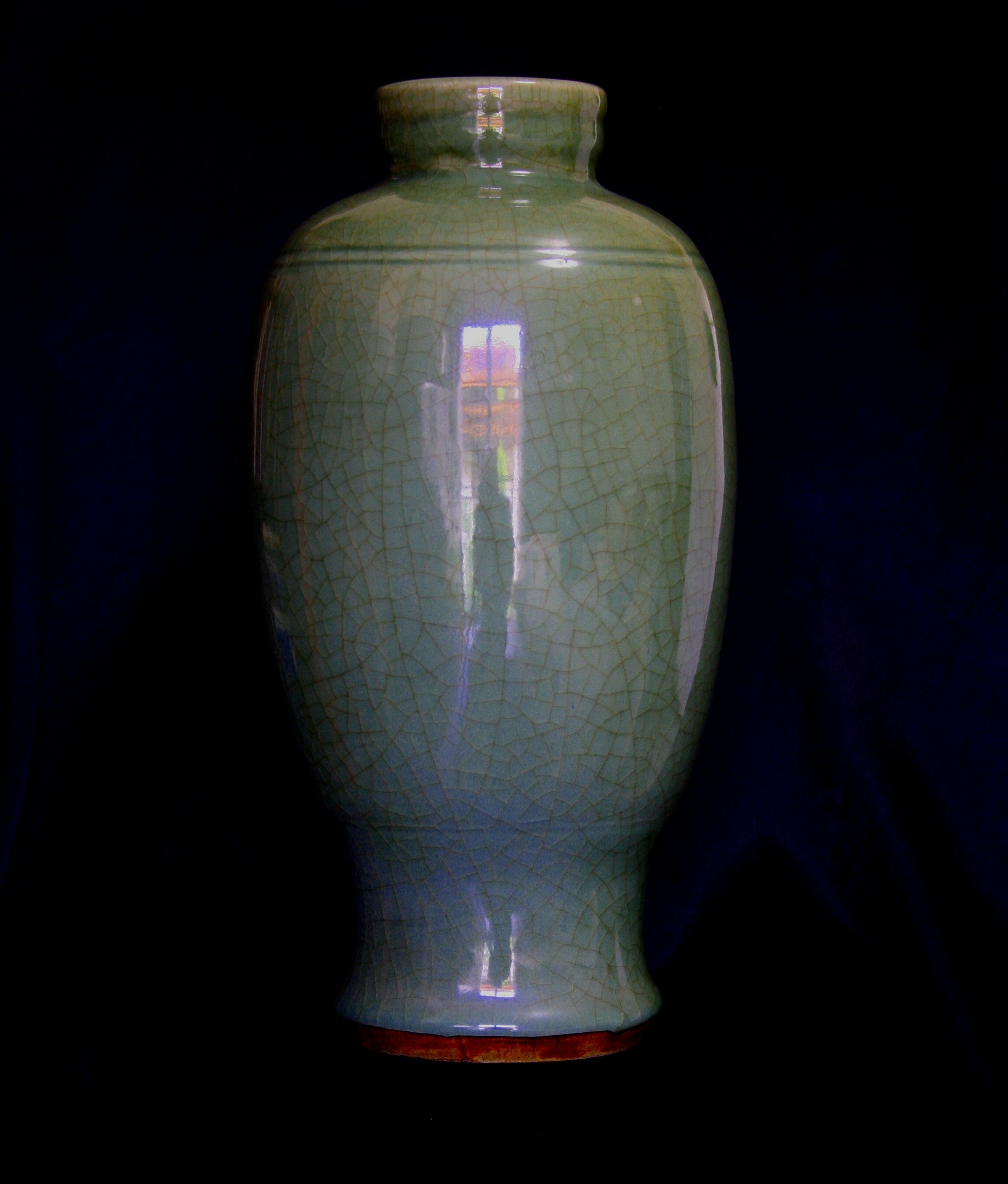 Японская ваза из селадона